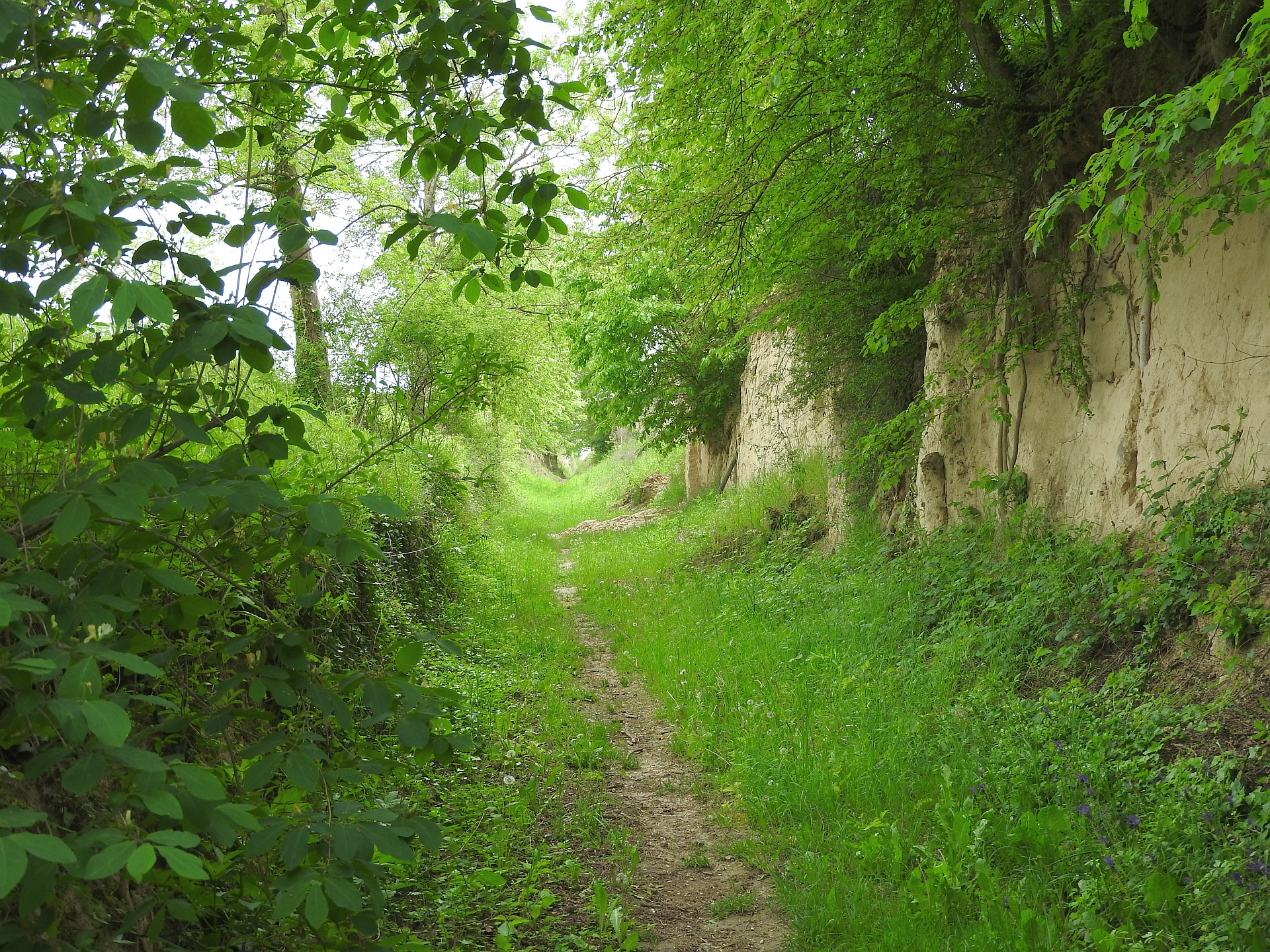 Naturschutzgebiet Beim Roten Kreuz, 14.05.2016